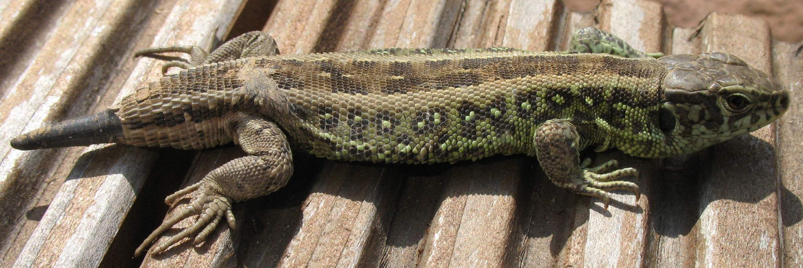 Zauneideckse auf Holz